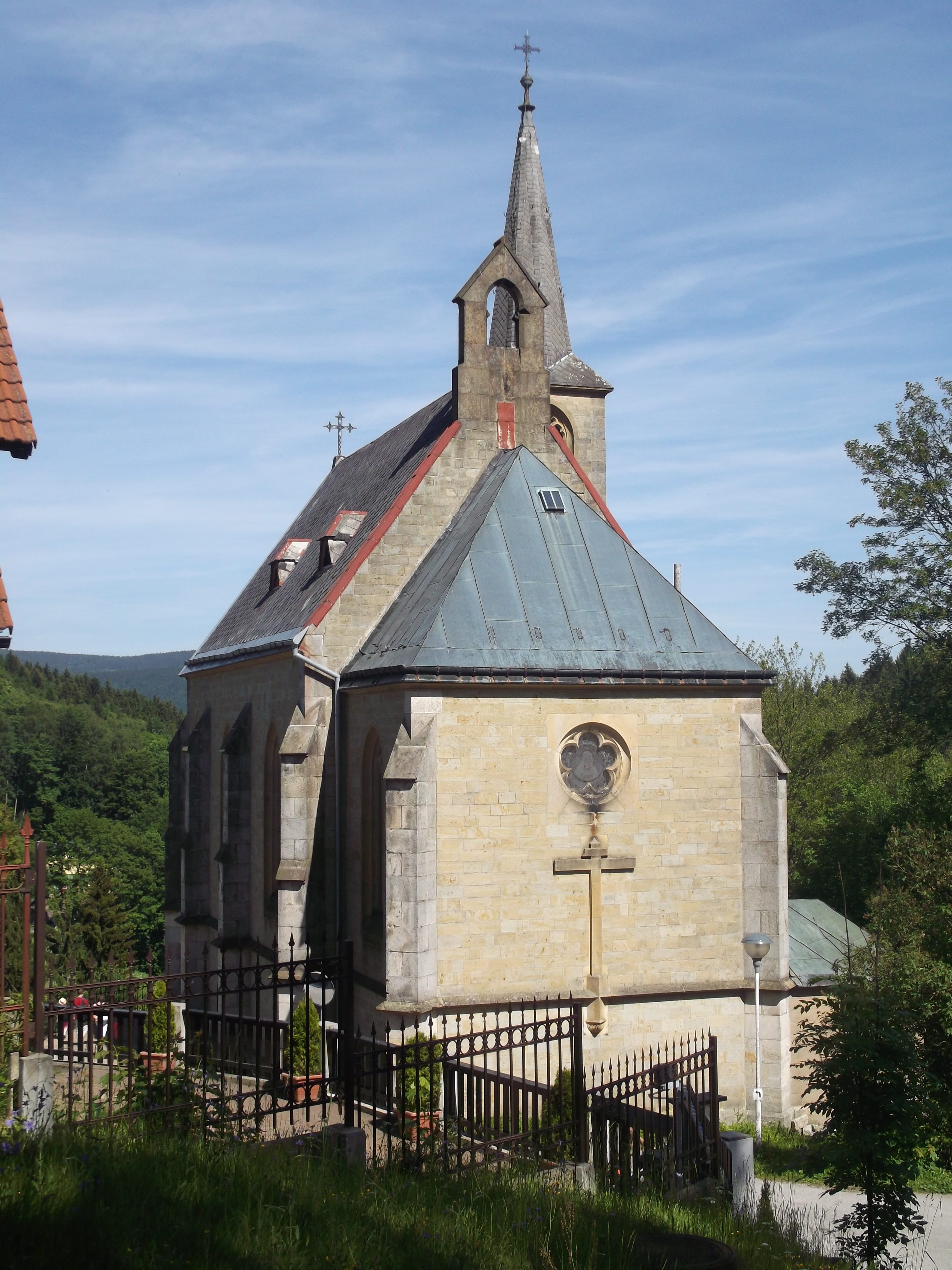 Kostel sv. Jana Křtitele, U Mariána, Janské Lázně.